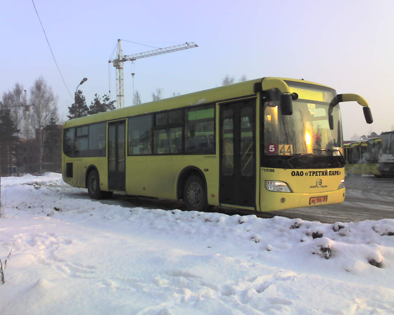 Автобус Golden Dragon в Санкт-Петербурге - Bus Golden Dragon, St. Petersburg